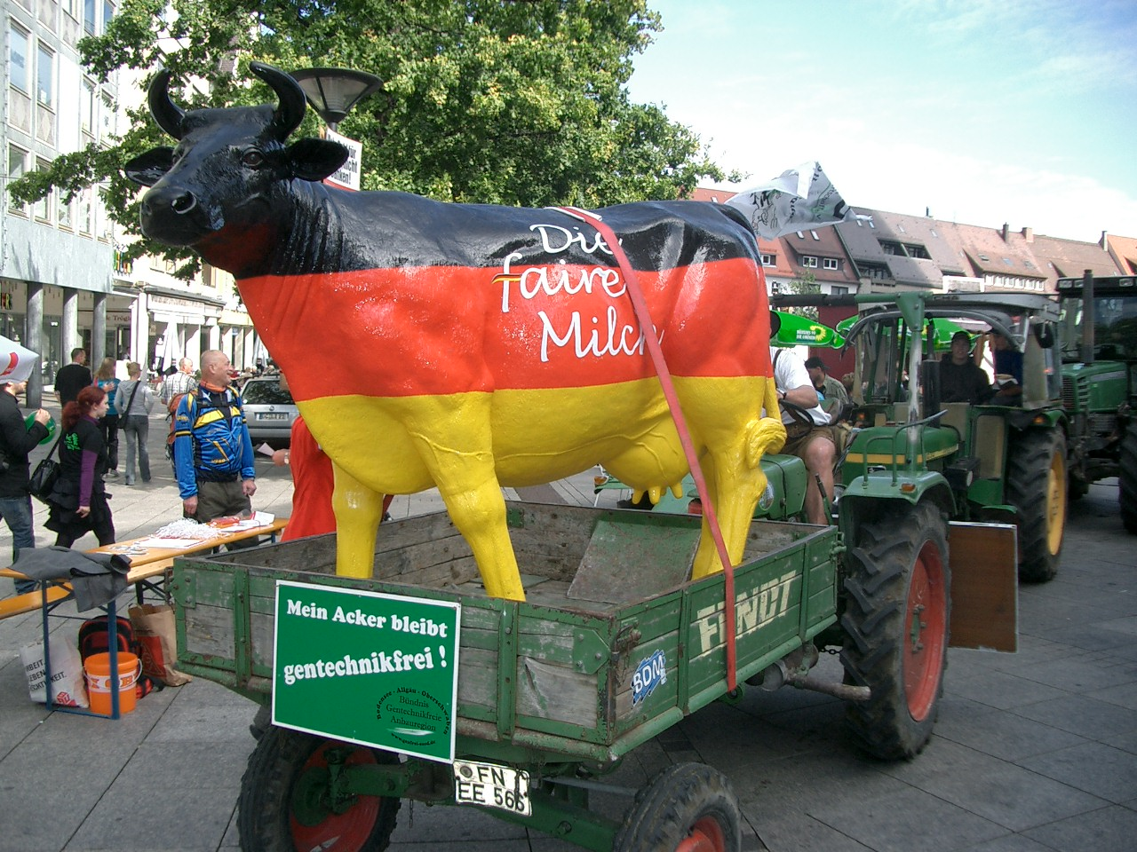 Fendt-Geräteträger mit „Faironika“-Kuh und Schild „Mein Acker bleibt gentechnikfrei“ bei einer Demonstration gegen Gentechnik in Ulm am 13. September 2009